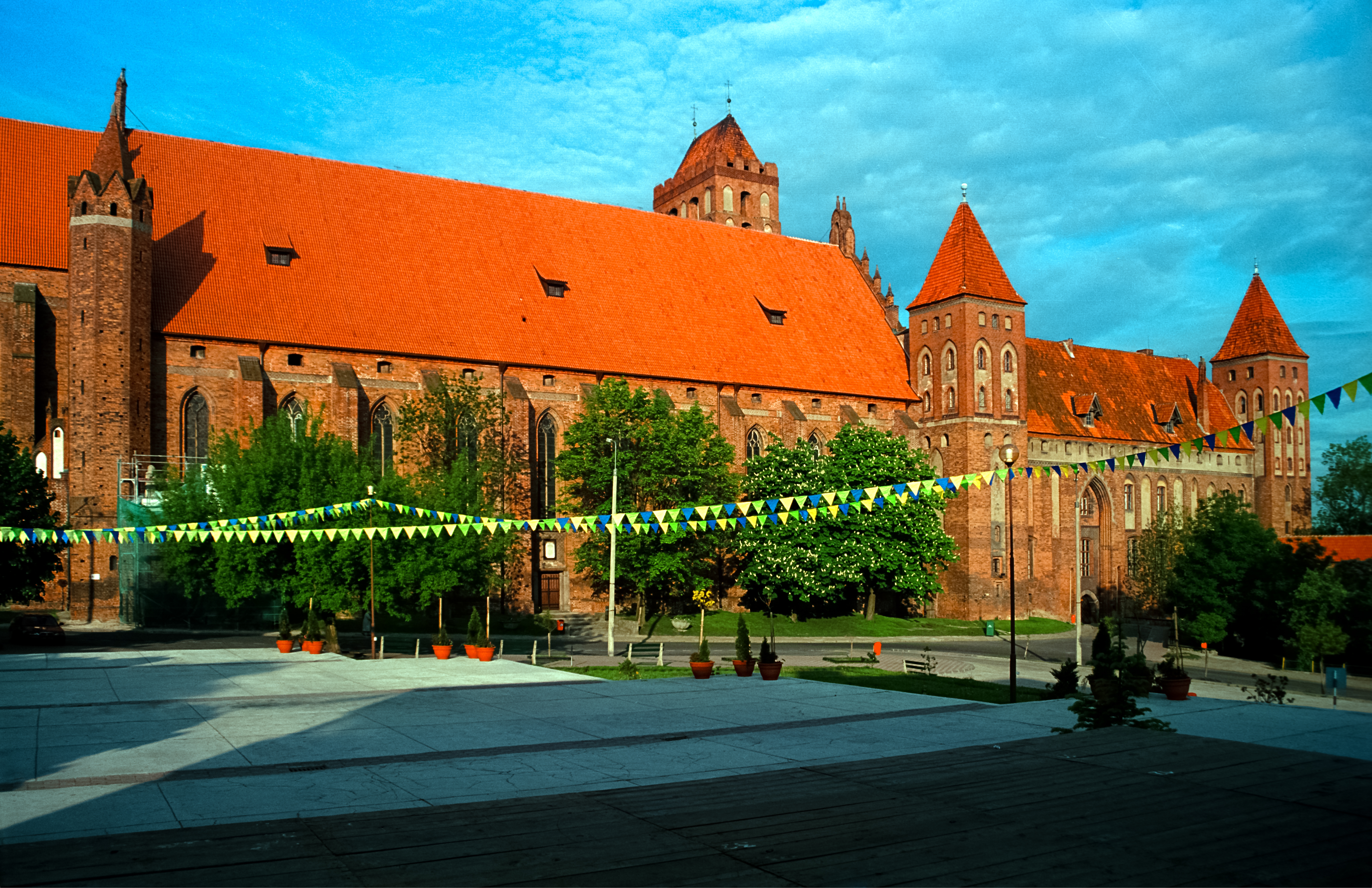 Kwidzyn